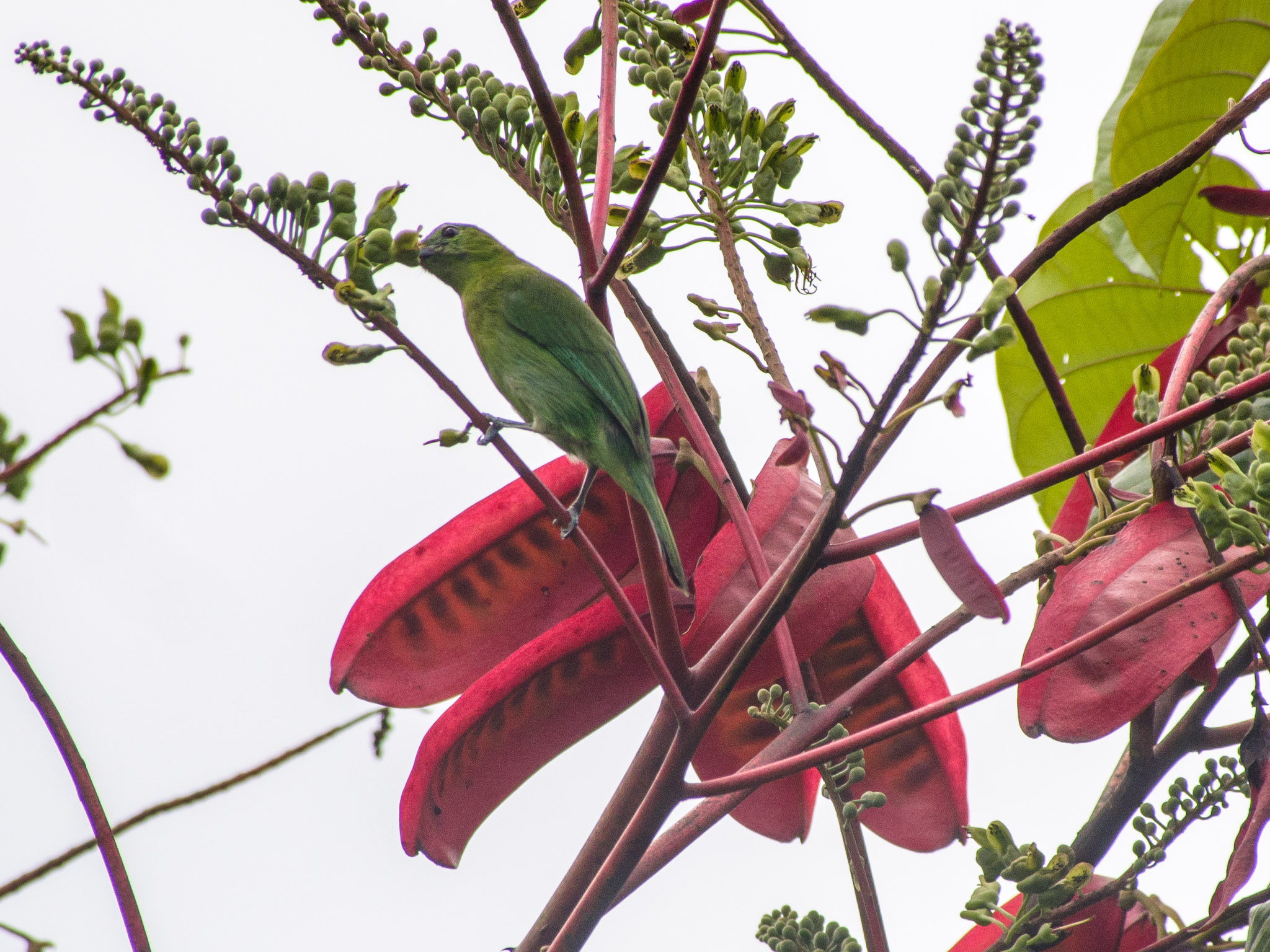 Lesser Green Leafbird